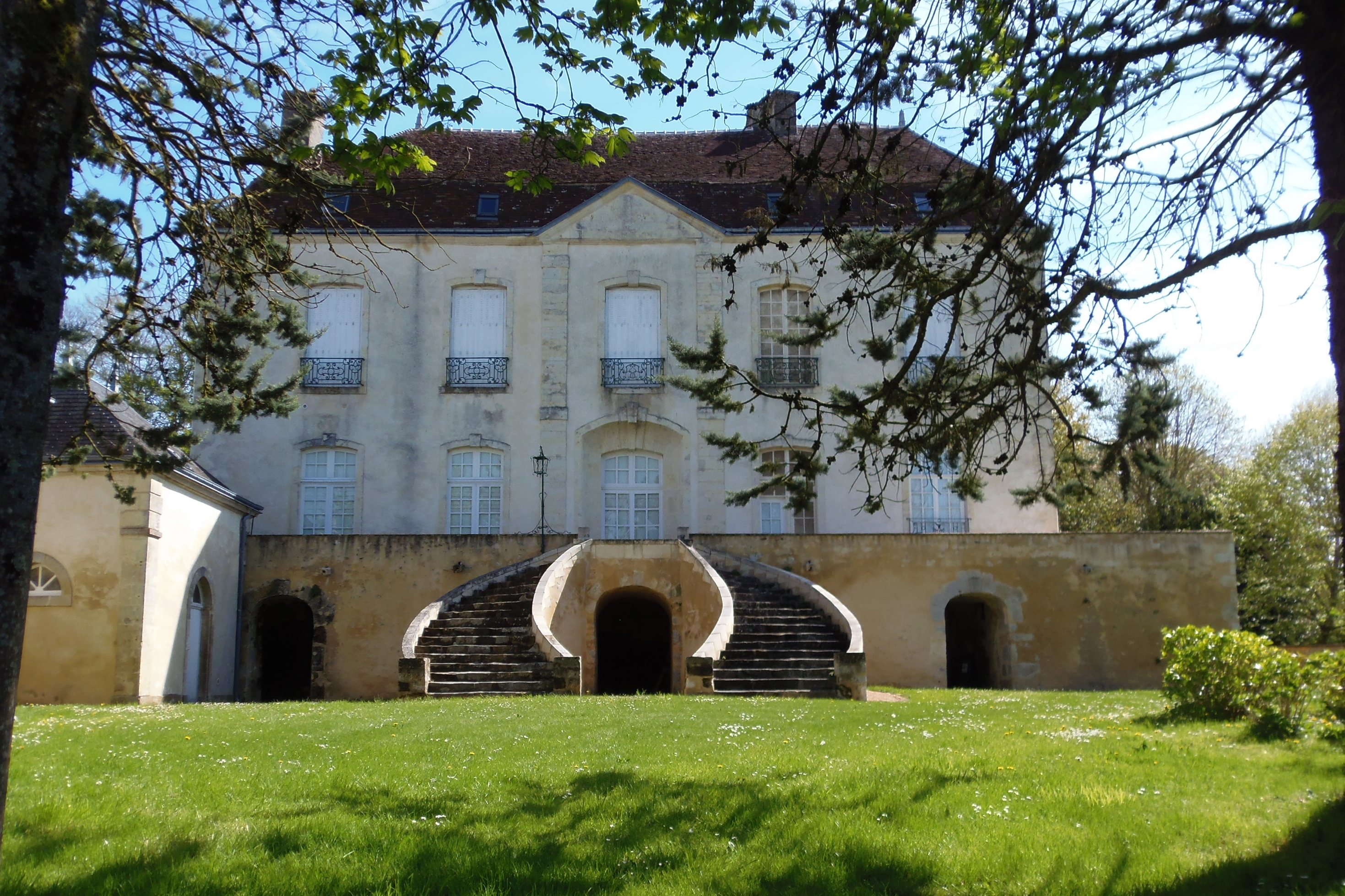 Nocé (Normandie, France). Le manoir de Barville.